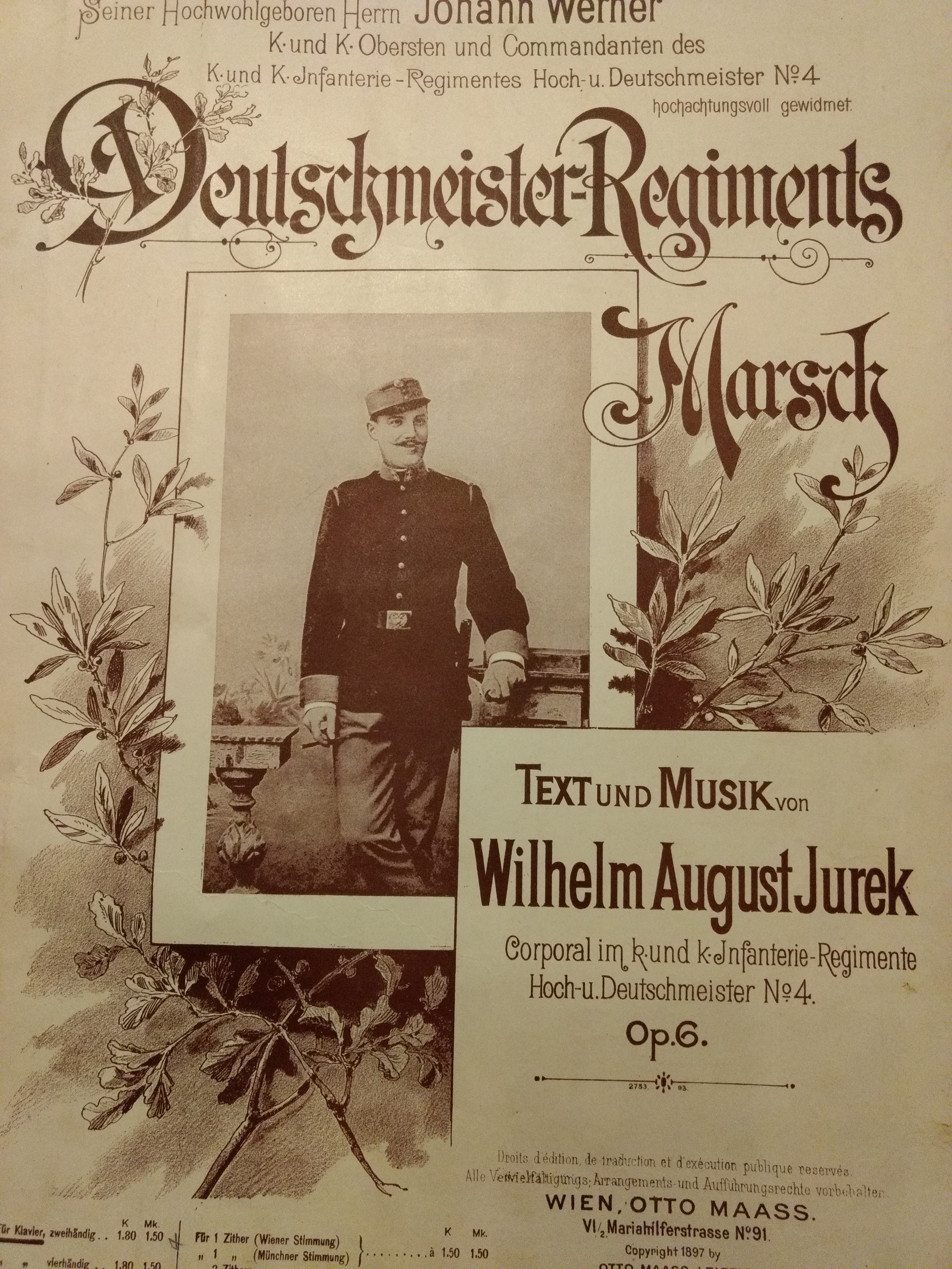 Deckblatt einer frühen Notenausgabe.